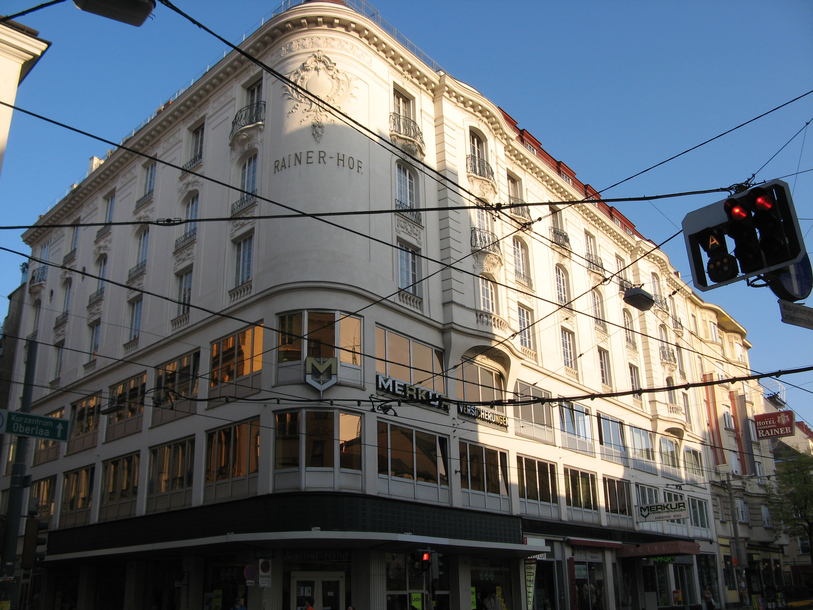 Rainerhof (1911/12) von Rudolph Erdös, Wiedner Hauptstraße 23-25, Wien-Wieden